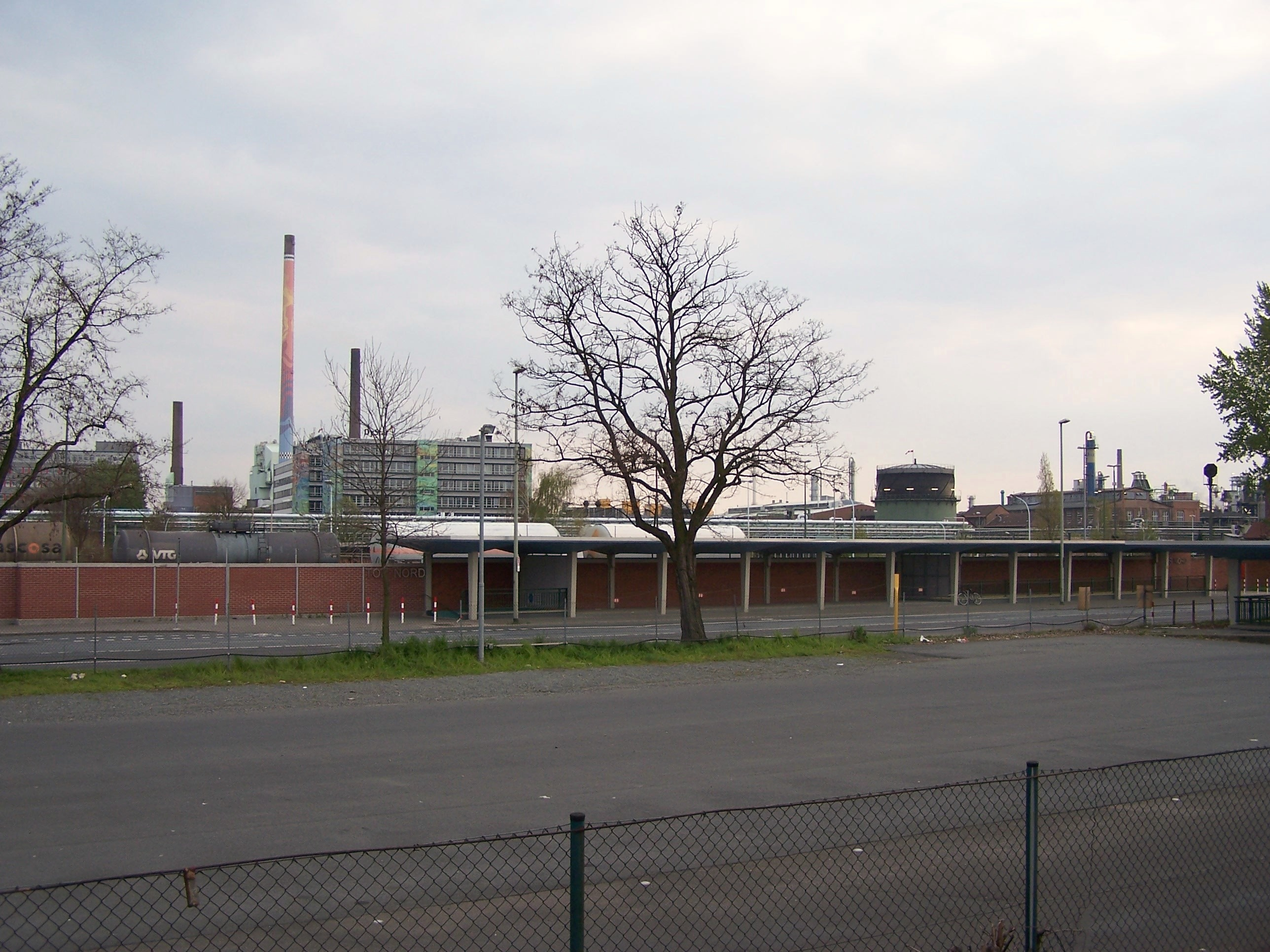 Industriepark Höchst Tor Nord am der Hoechster-Farben-Straße aus Richtung Bahnsteig.